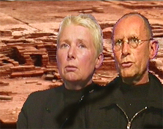 Portrait de Anne et Patrick Poirier